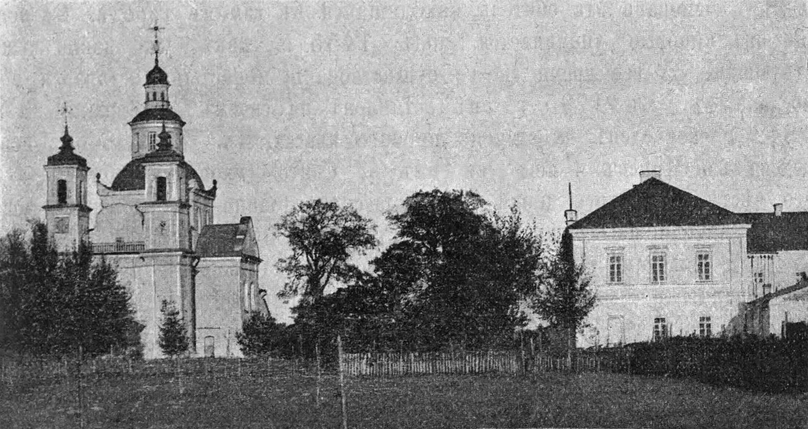 Слуцк, Трайчаны. Манастыр Святой Тройцы. Фотаздымак 1909 года.Беларуская (тарашкевіца): Слуцак (Słucak), Трайчаны (Trajčany). Манастыр Сьвятой Тройцы